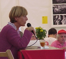 Krimiautorin Doris Gehrke